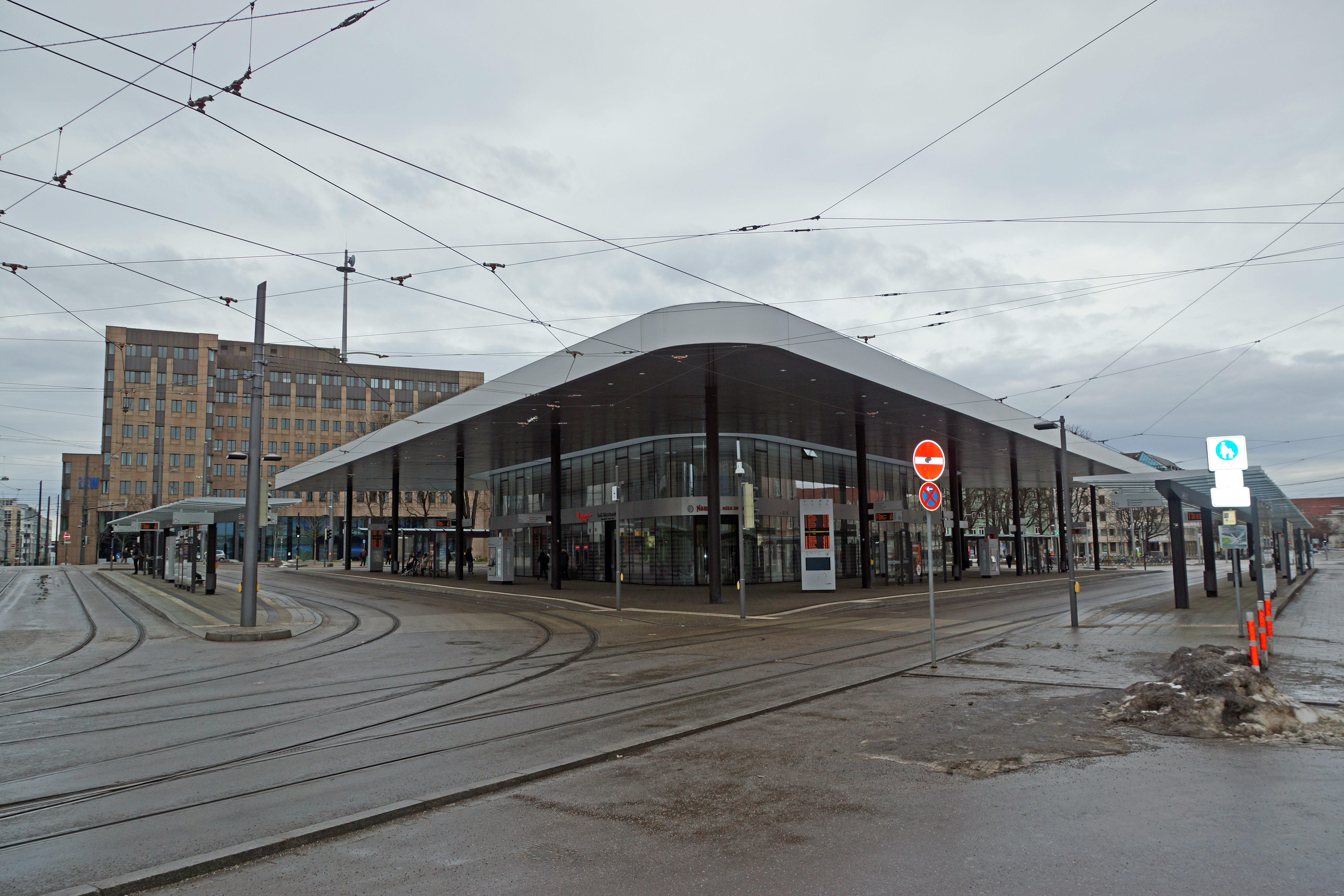 2019-01-27 Augsburg 001 Königsplatz